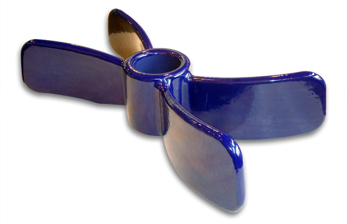 Emaillierter Rührer